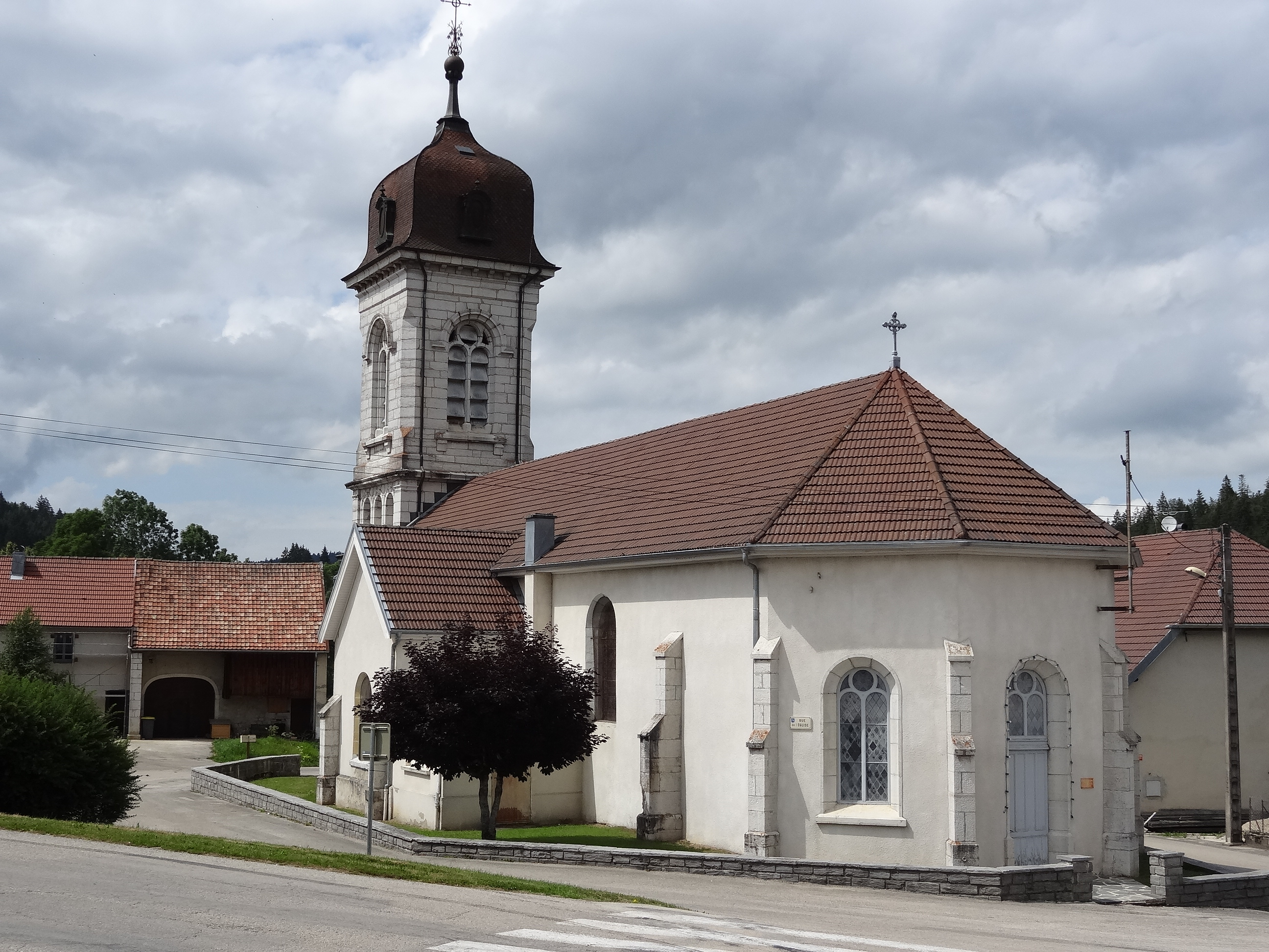 Vaux-et-Chantegrue (Doubs) - église